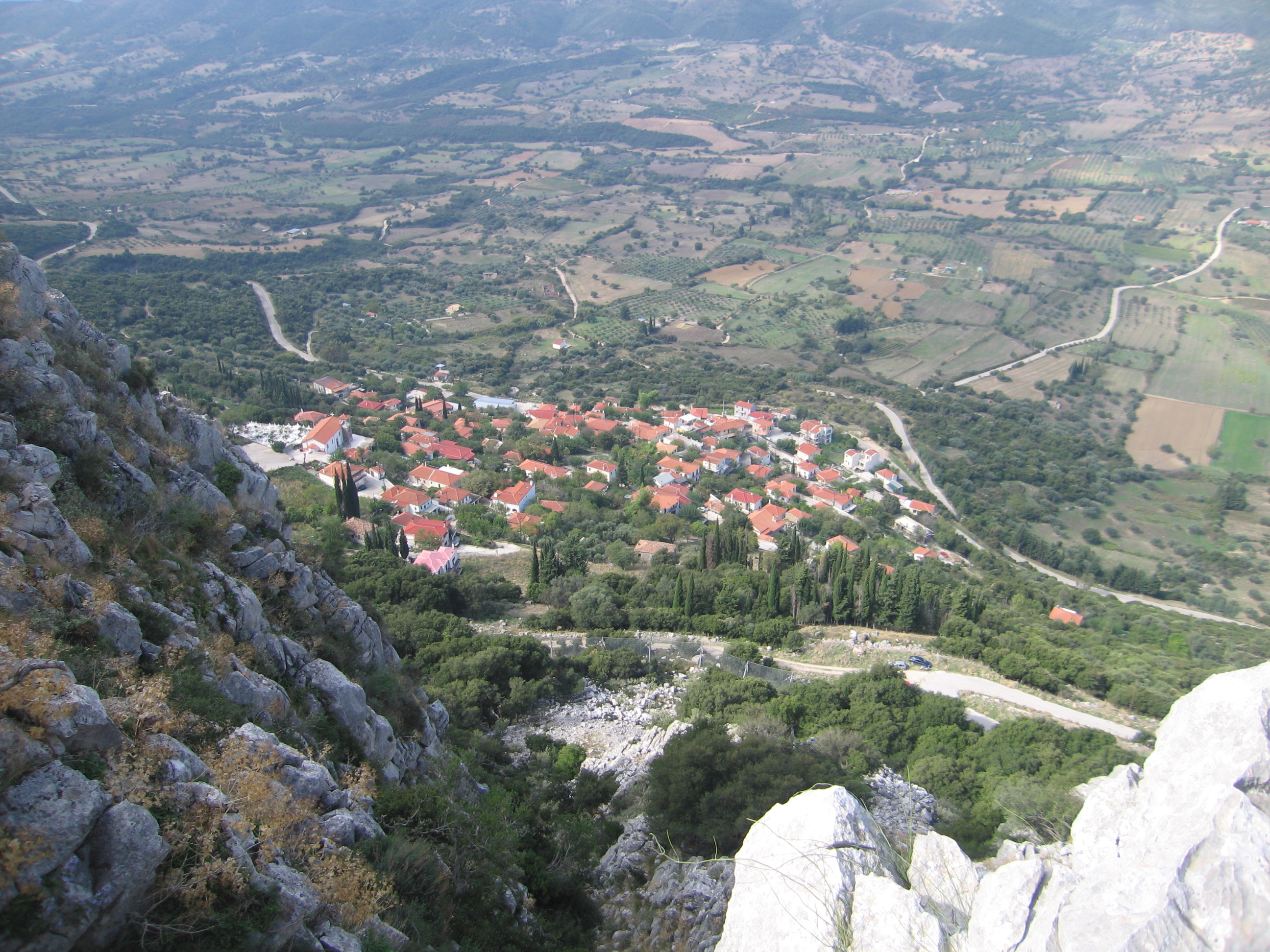 Άποψη από το βουνό